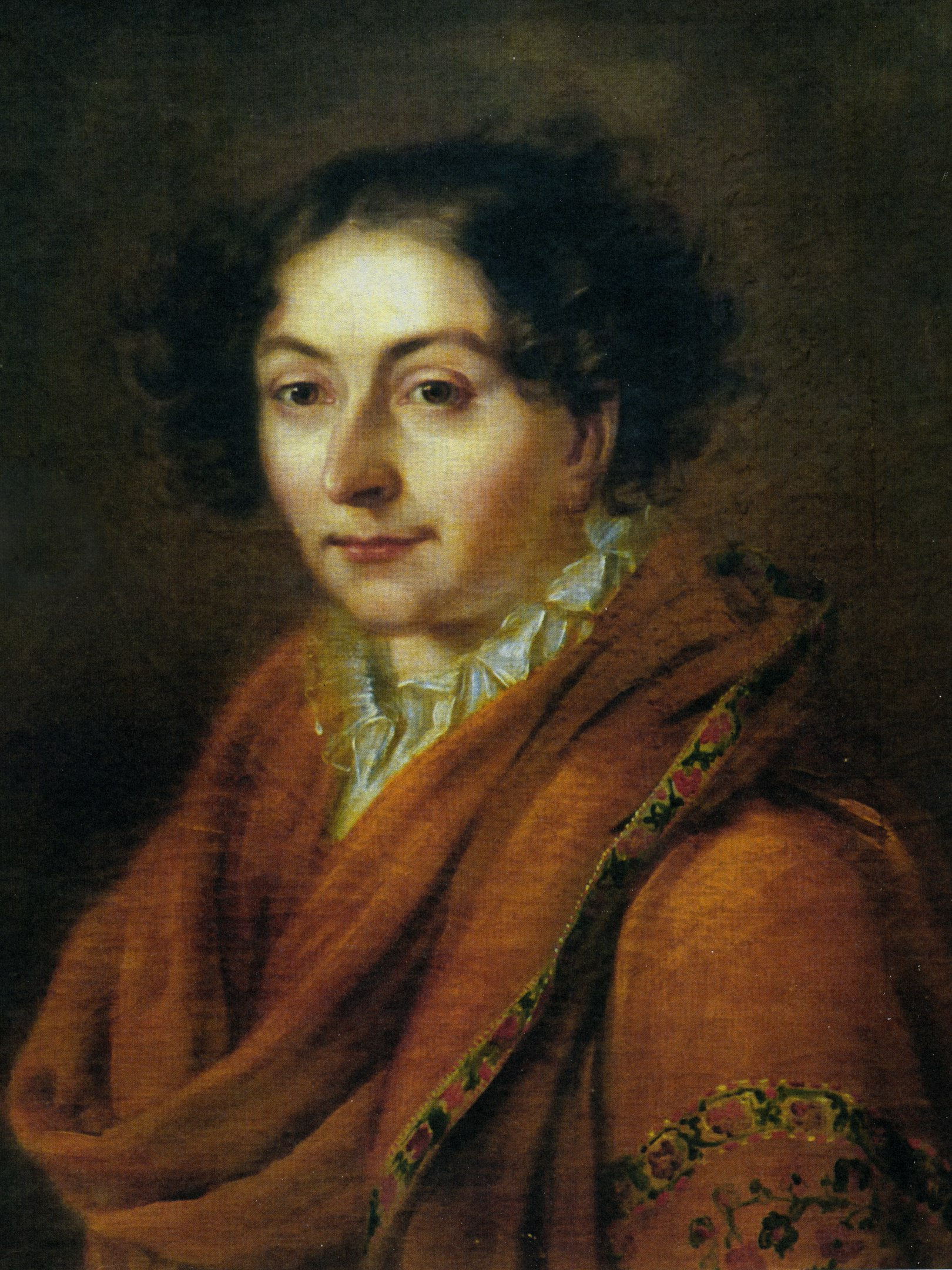 Варвара Александровна Ланская, ур. Одоевская (ум. 1845), жена сенатора Д. С. Ланского. Ранее портрет Варвары Матвеевны Ланской, ур. Пашковой (ум. 1831)